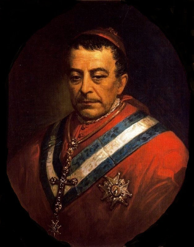 Retrato del cardenal Miguel García Cuesta. Fue catedrático de la Universidad de Salamanca, rector del Seminario Conciliar de Salamanca, obispo de Jaca (1848), arzobispo de Santiago de Compostela (1851), senador vitalicio (1851) y cardenal (1861).